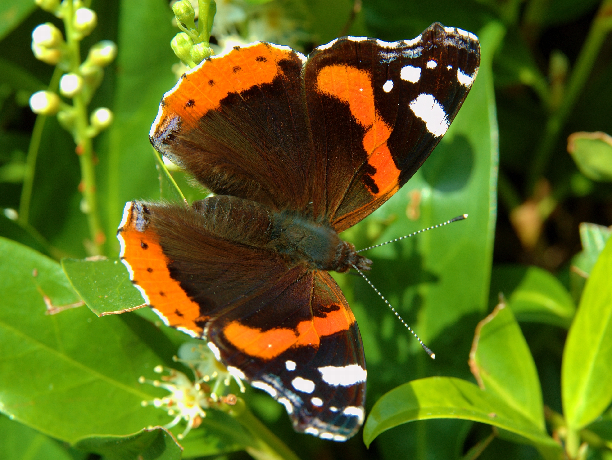 Vanessa atalanta (Linnaeus, 1758) Butterfly (Belgium Hamois)